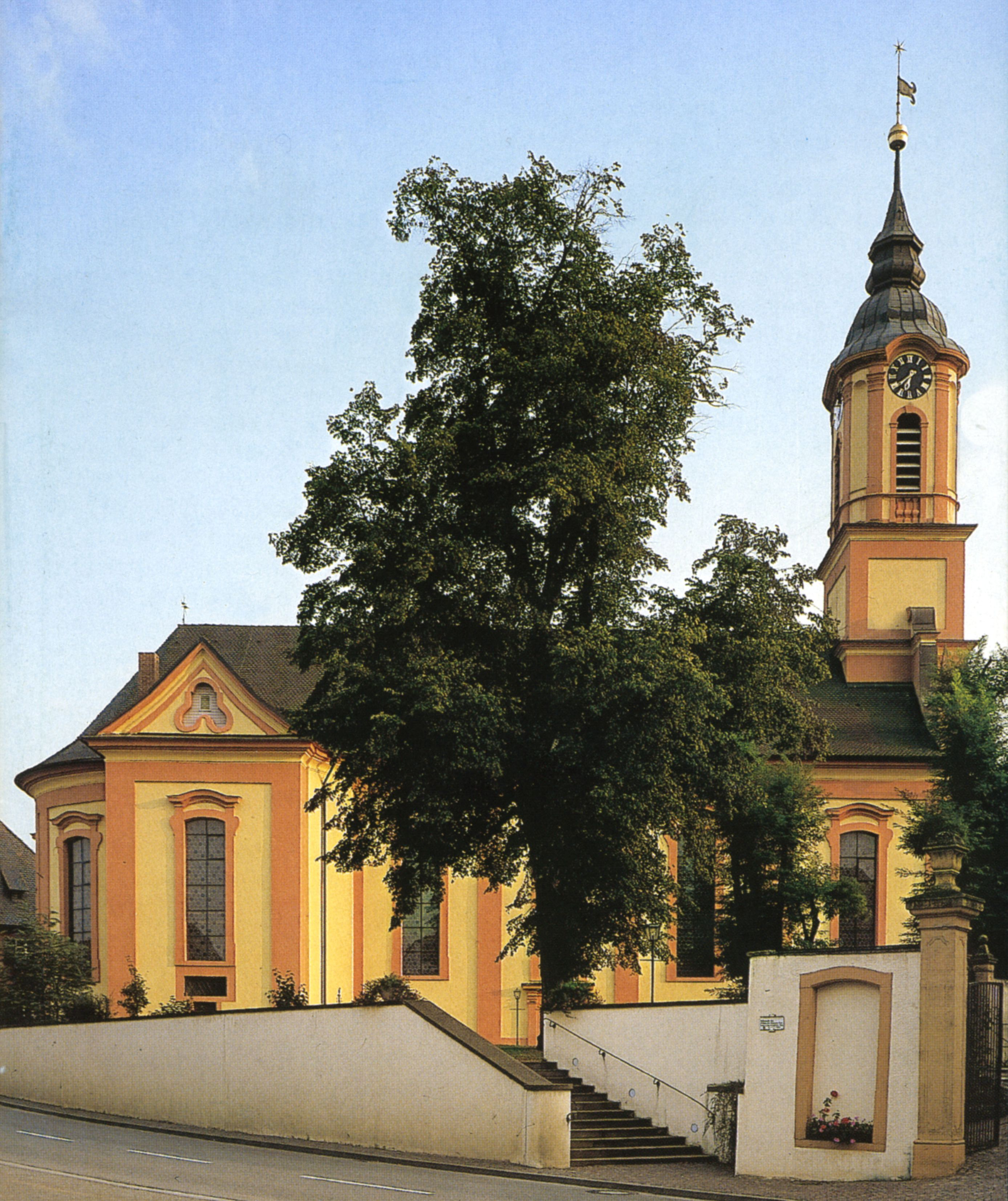 Umschlagbild des Kunstführers Merdingen (Detail)